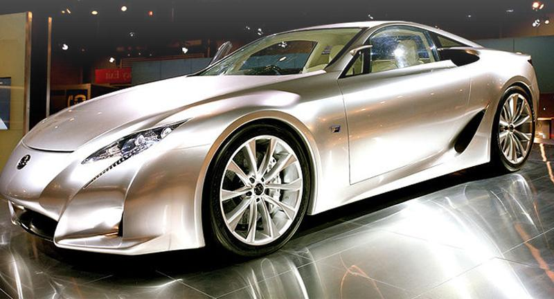 Lexus LF-A